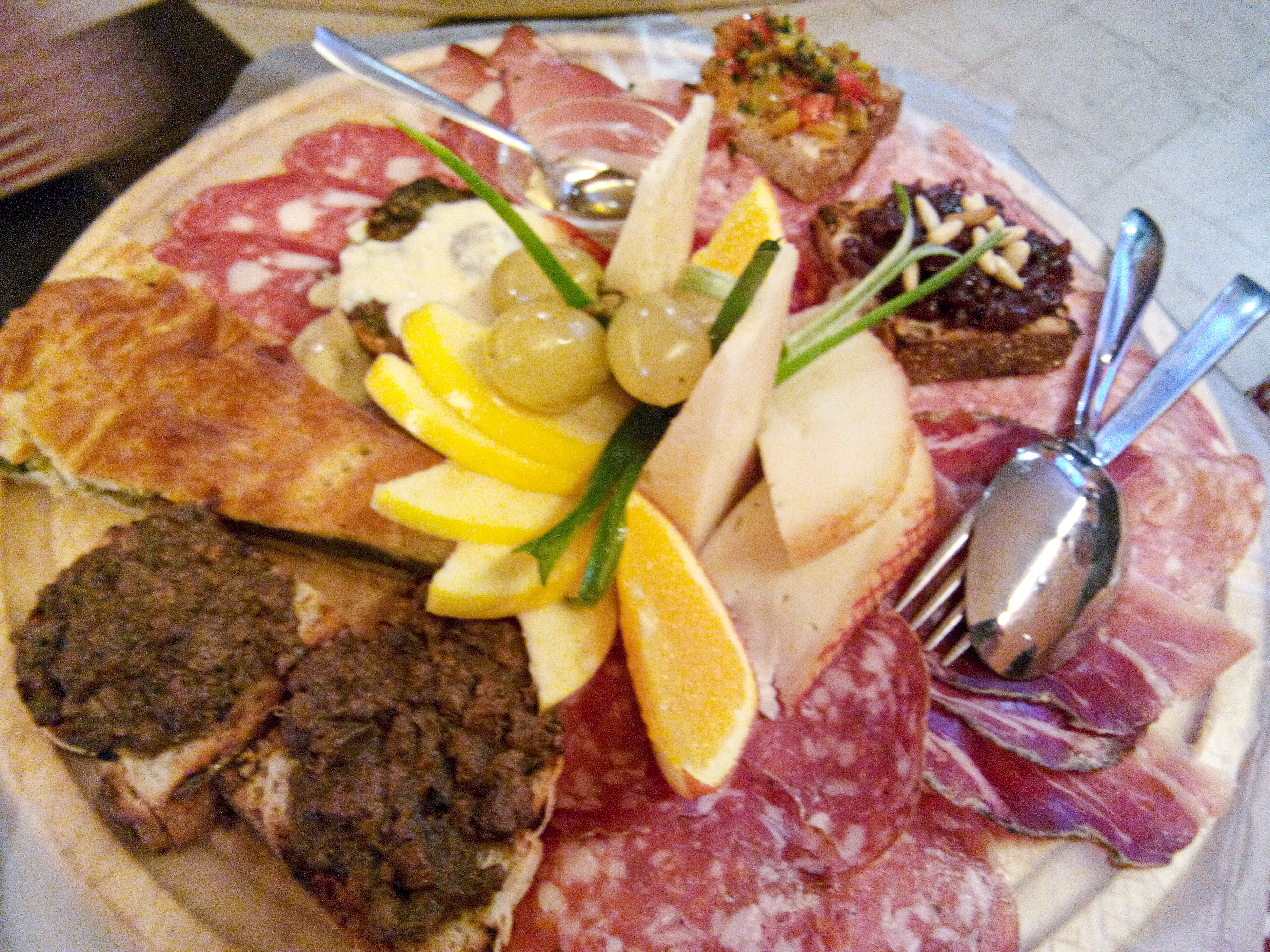 Tagliere con affettati misti toscani, crostini di fegato, frutta, tortino di verdure, pecorini, frutta.